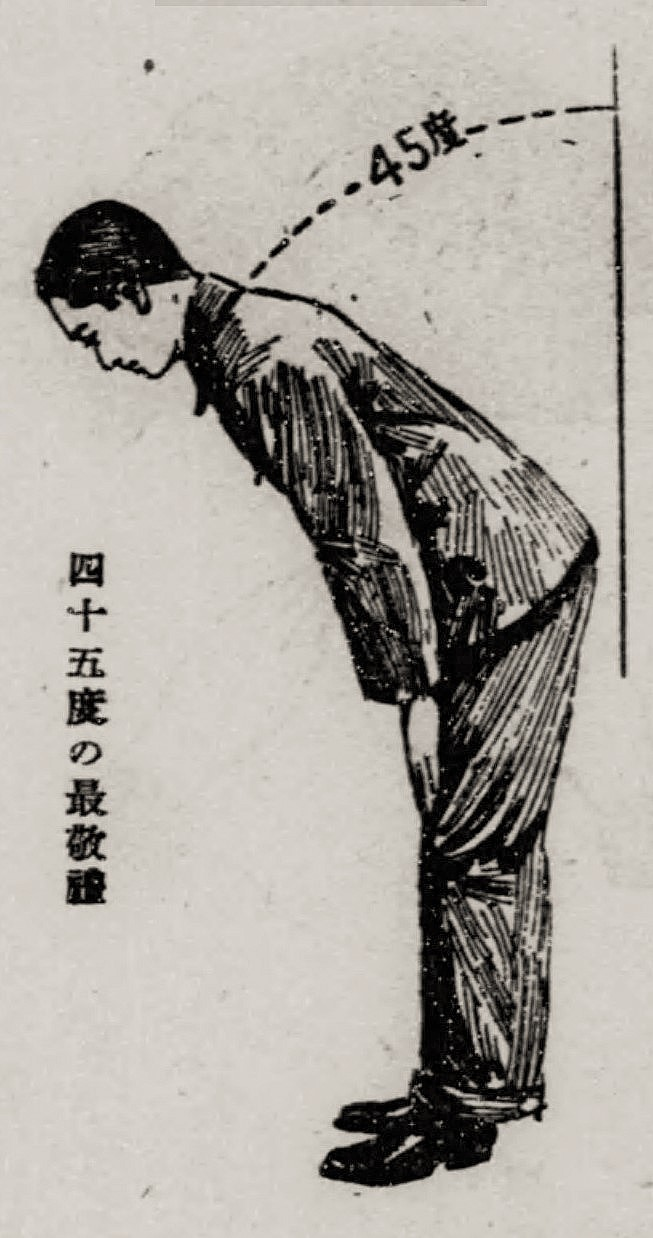 立っているときの最敬礼